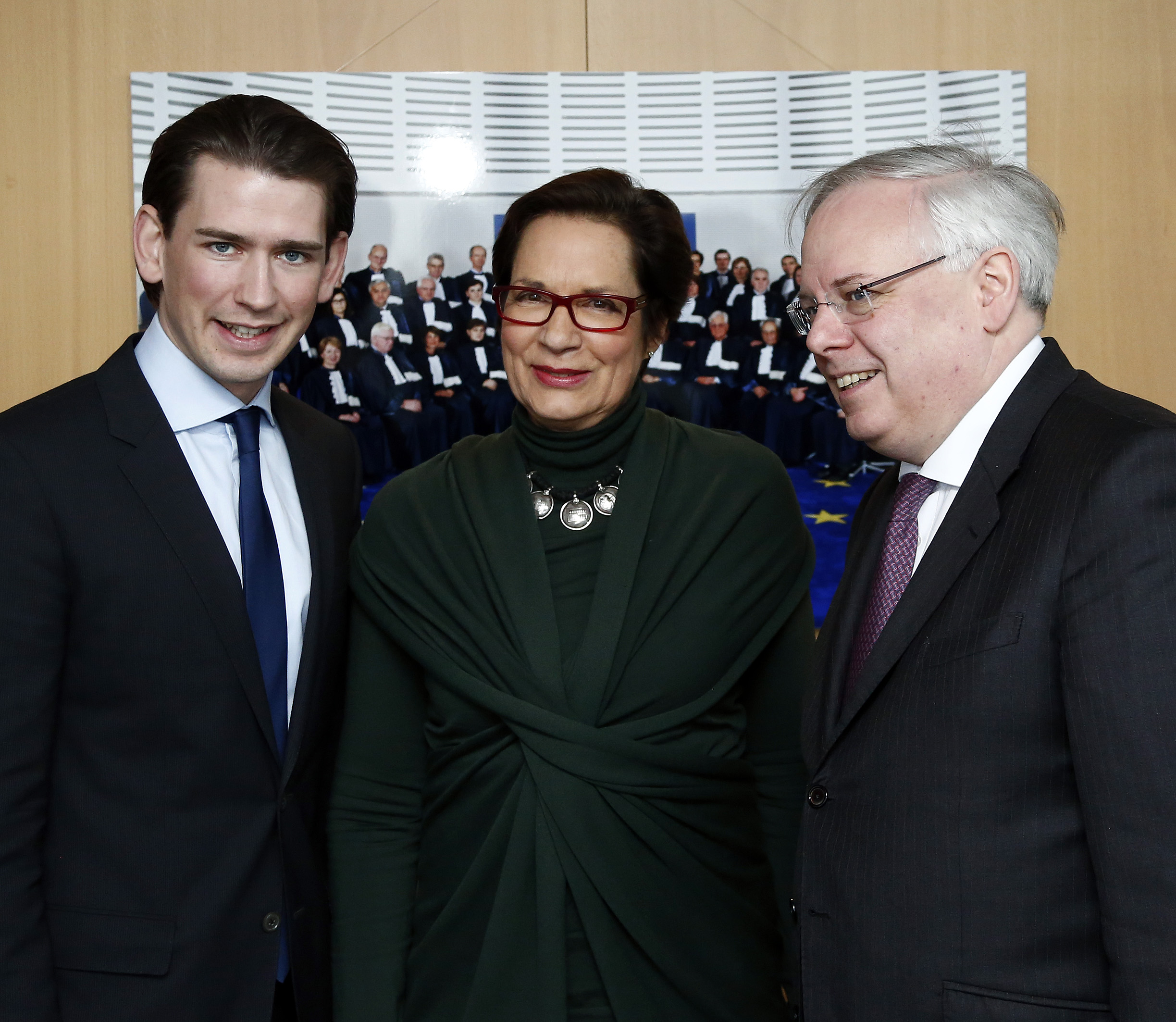 Treffen von Außenminister Sebastian Kurz mit dem Präsidenten des EGMR, Dean Spielmann und Elisabeth Steiner, österreichische Richterin am EGMR. Strassburg, 27.01.2014, Foto: Dragan Tatic